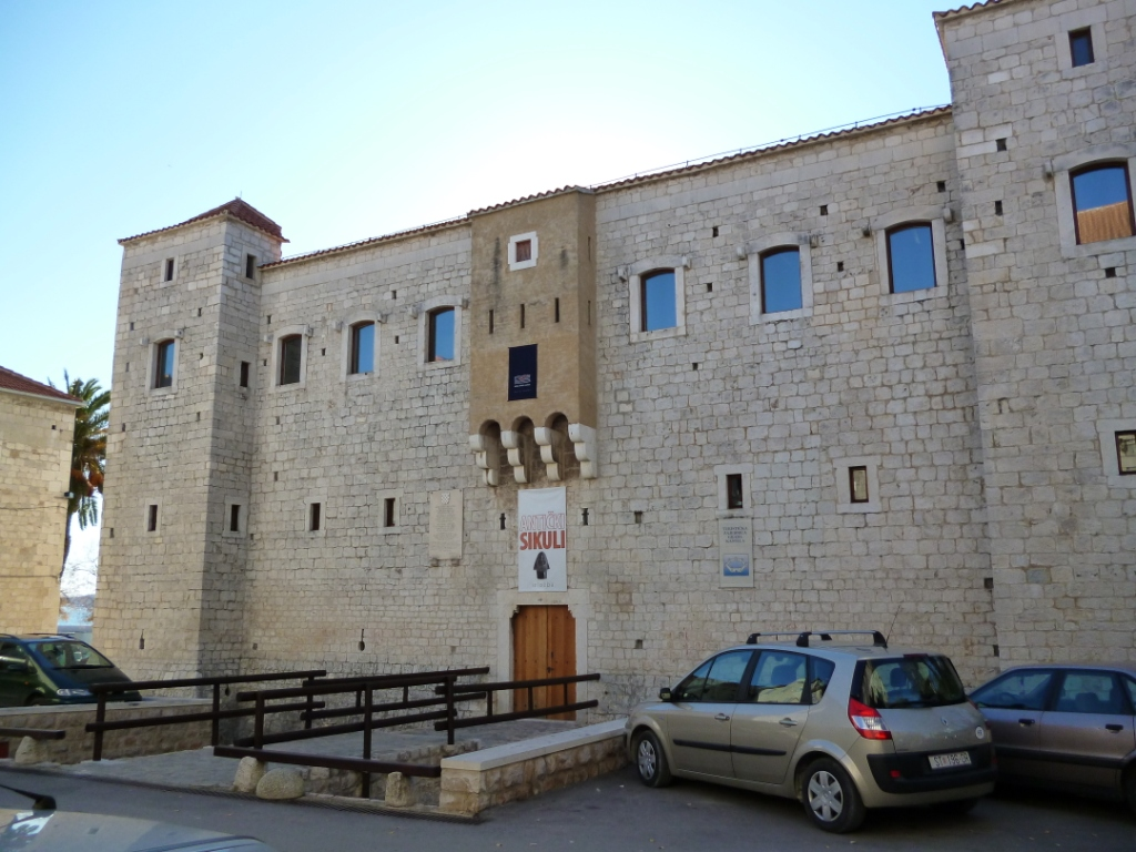 kaštel Viturri u Kaštel Lukšiću